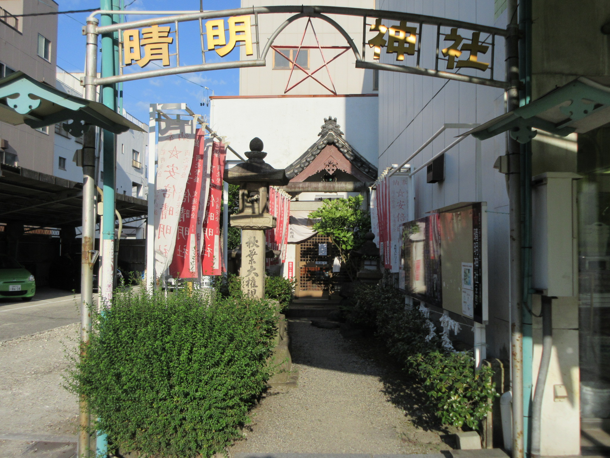 晴明神社（岡崎市本町通）